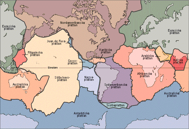 från en:Image:Tectonic_plates.png; +svenska